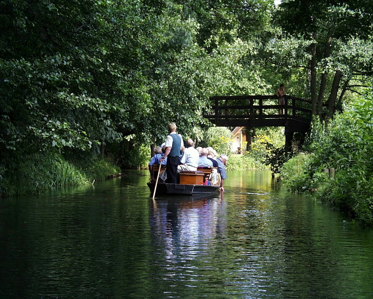 Ein Ausflugskahn bei Burg im Spreewald